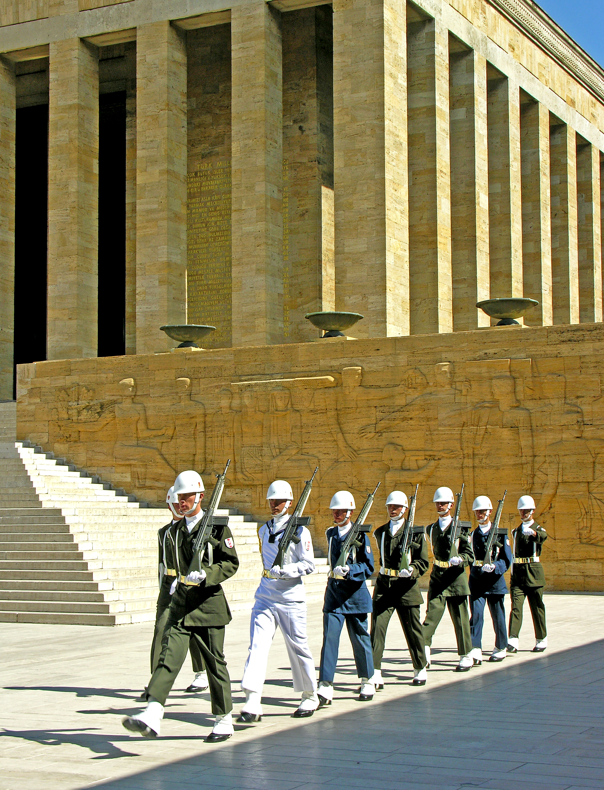 Turkey-1658